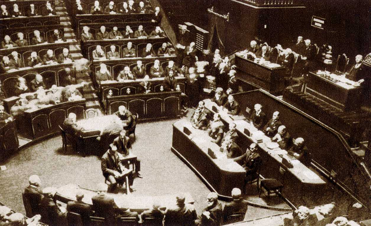 Mussolini al Senato del Regno d' Italia durante una seduta politica